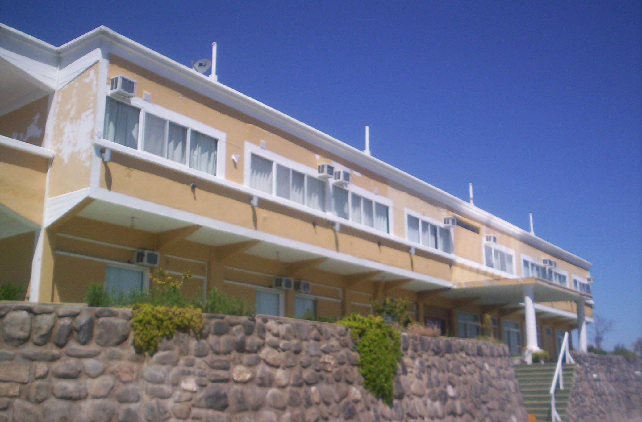 Vista a la fachada frontal del hotel ubicado en el Santuario de la Difunta Correa, Vallecito, departamento Caucete provincia de San Juan Argentina